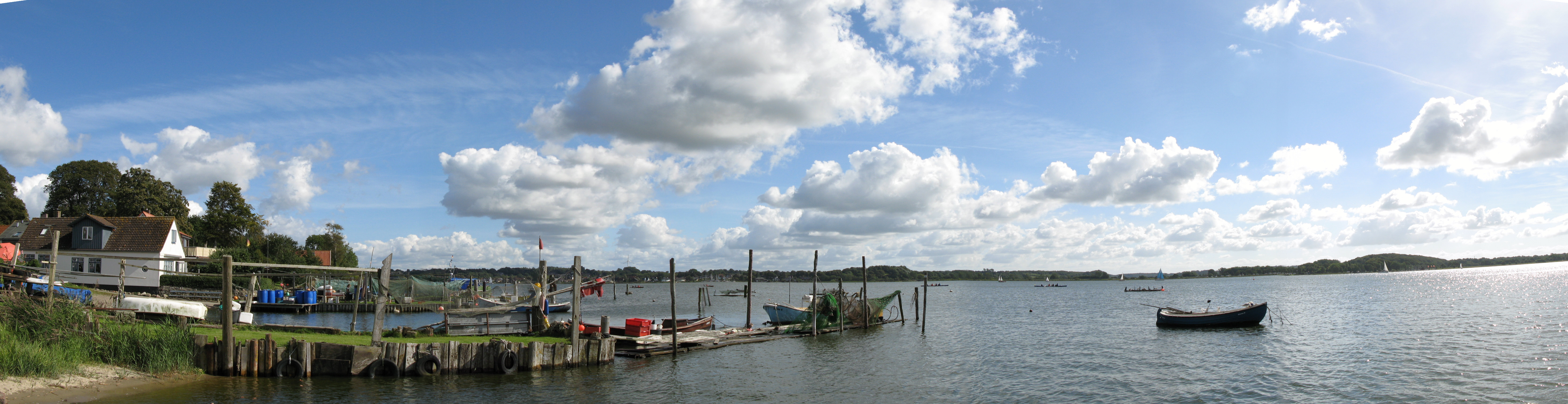 Schlei vom Holm in Schleswig aus gesehen